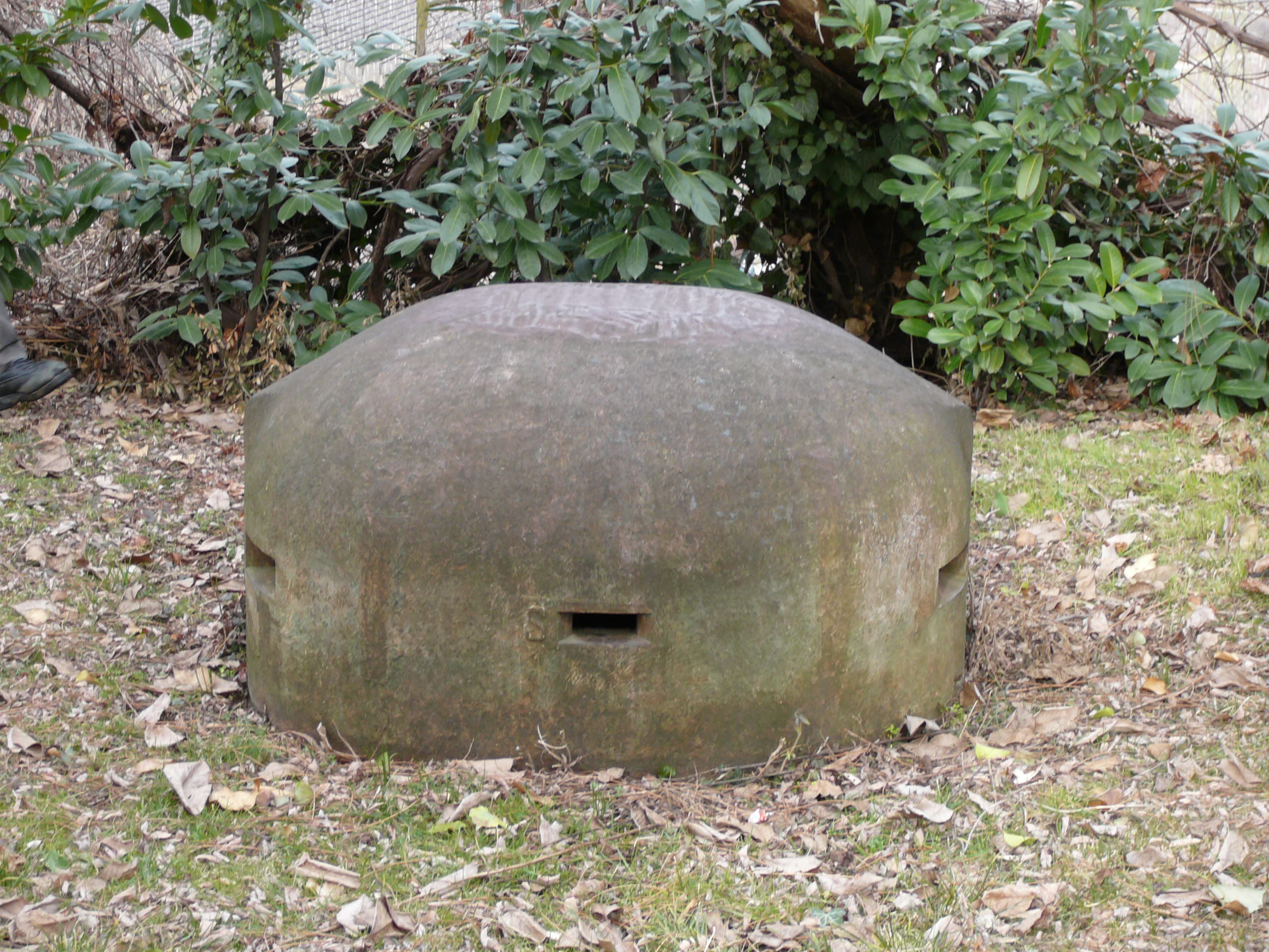 Opera 31 Bolzano